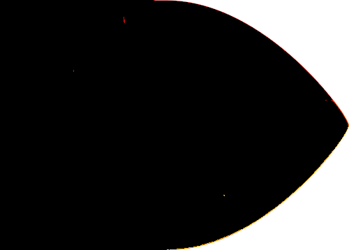 srednjovjekovna hr. zastava (iz Varnskog križarskog rata)